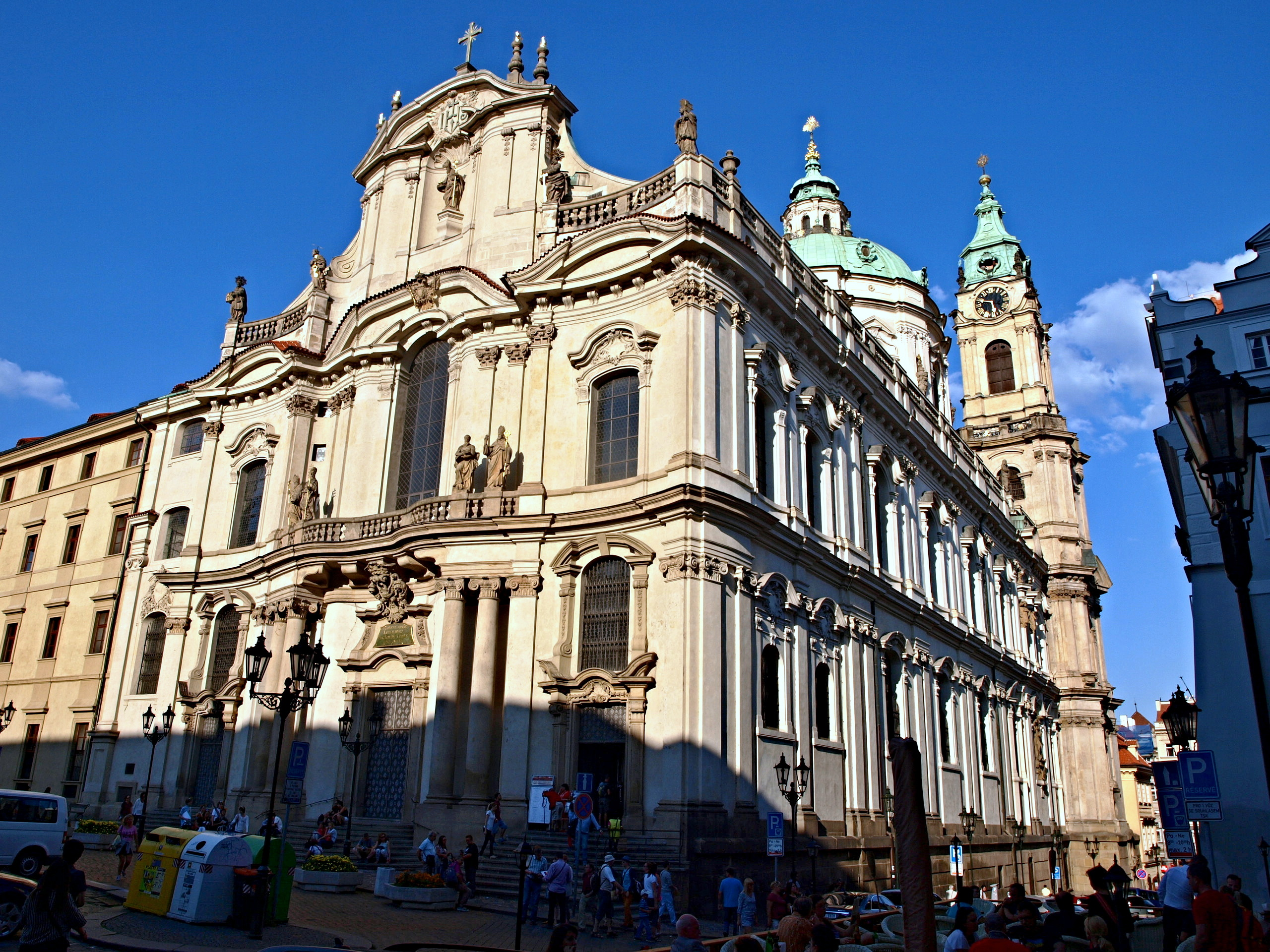 Kostel sv. Mikuláše na Malé Straně